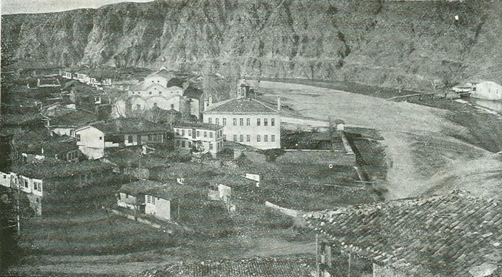 Църквата и училището в Ново село в началото на 20 век.